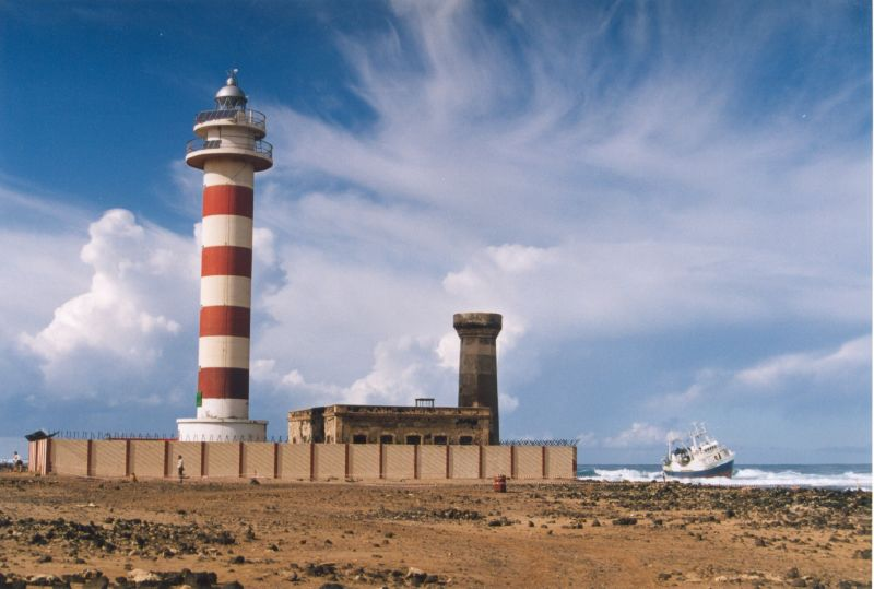 Faro de Punta Tostón. El Cotillo. Fuerteventura.